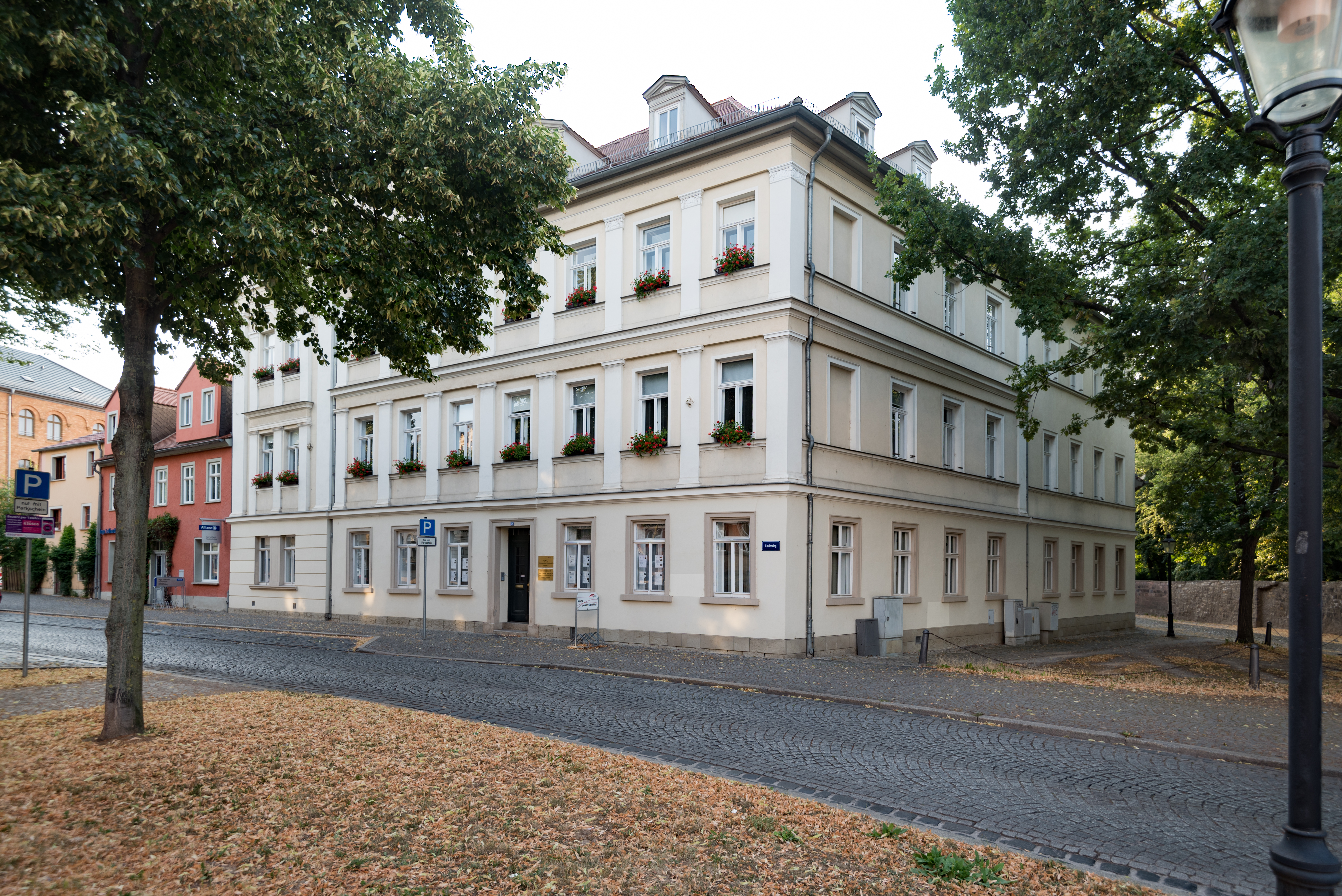 Naumburg (Saale), Lindenring 26